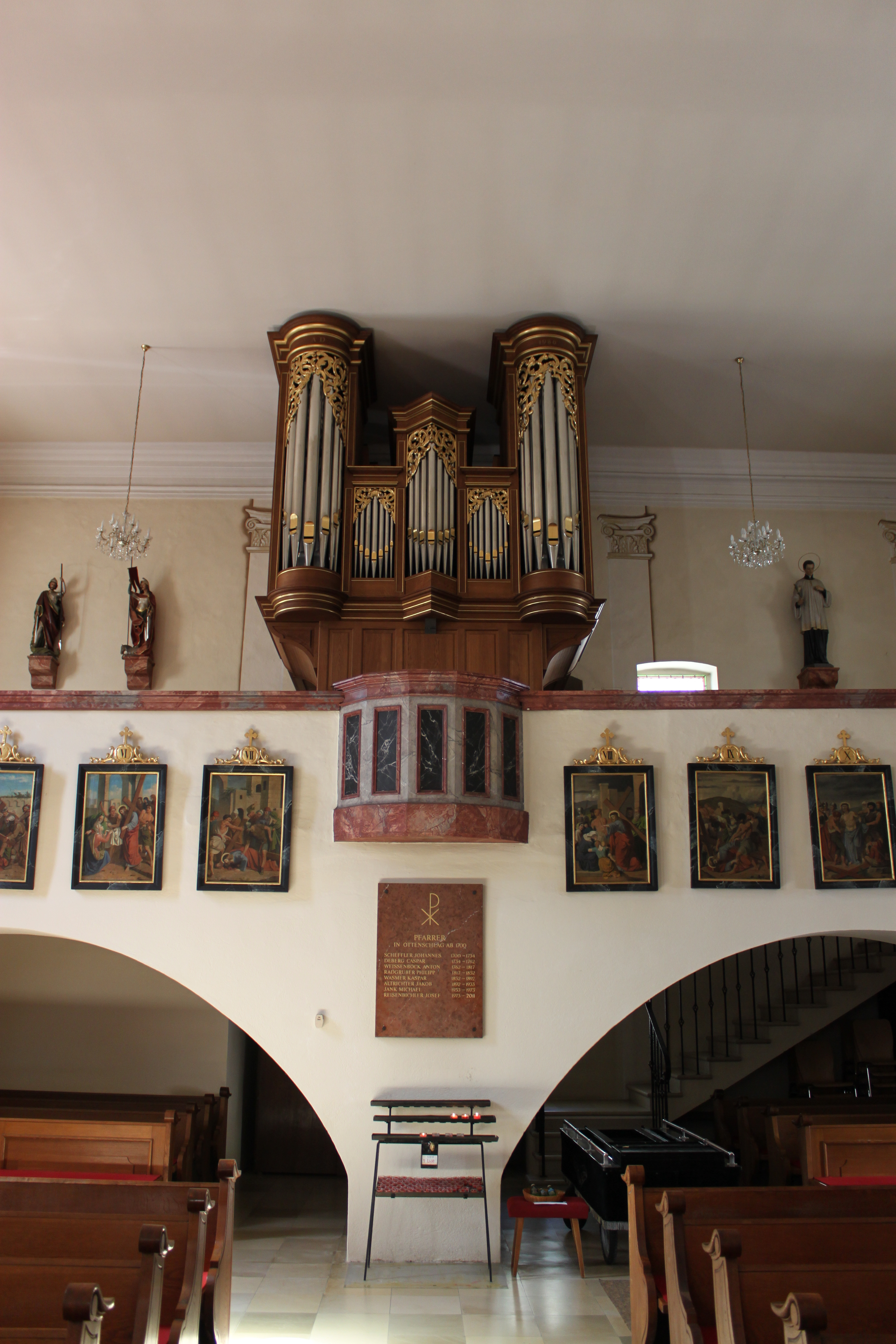 Orgel der Pfarrkirche Ottenschlag, Niederösterreich, errichtet von Freiburger Orgelbau Hartwig Späth